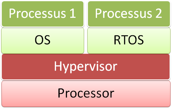 Le principal cas d'utilisation de la virtualisation dans les systèmes embarqués est de faire co-exister deux systèmes d'exploitation complétement différent sur un même processeur. Ici, un système d'exploitation temps réel et un d'application de haut niveau.